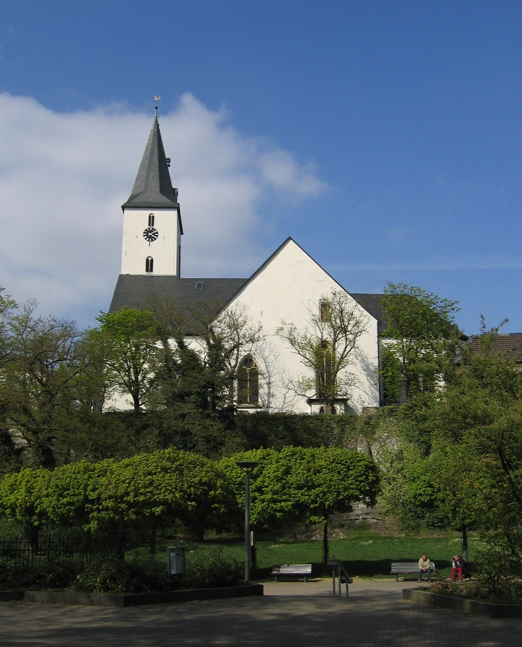 Oberste Stadtkirche (evangelisch) in Iserlohn.